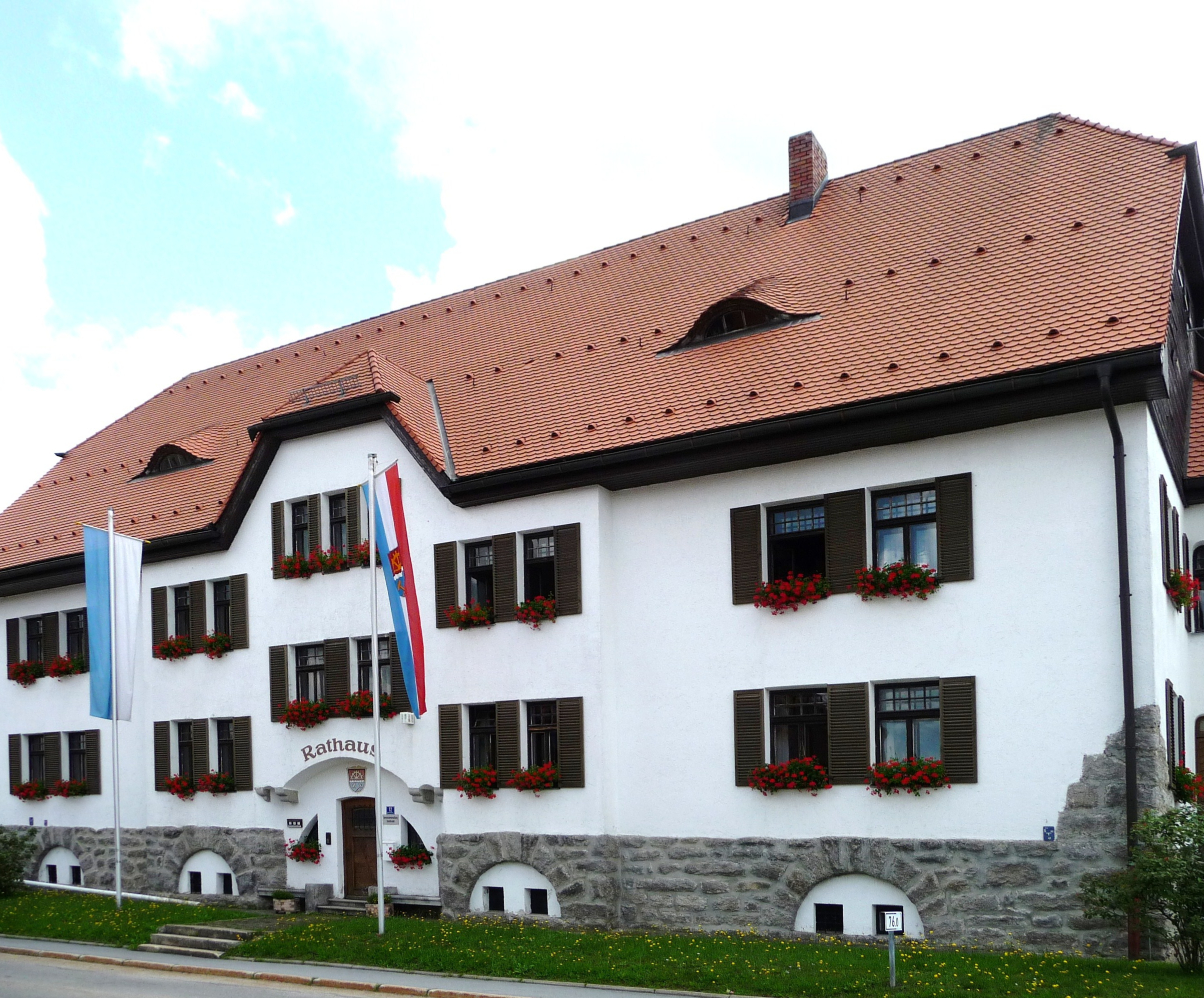 Das Rathaus von Haidmühle